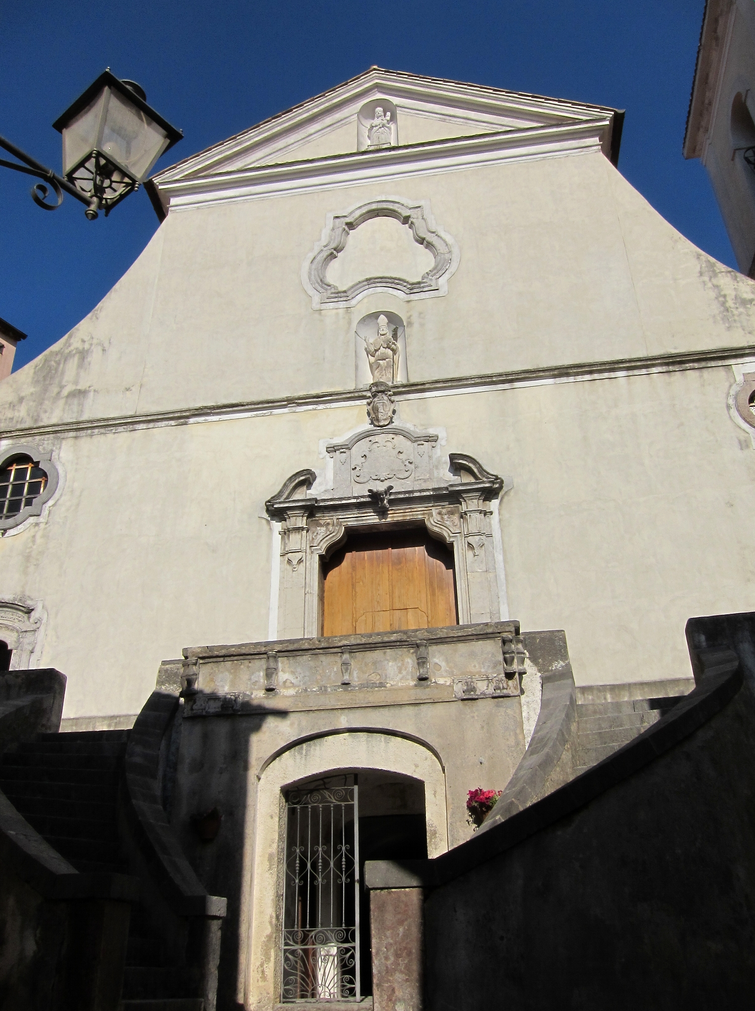 La chiesa di San Nicola à Rivello (Basilicate).